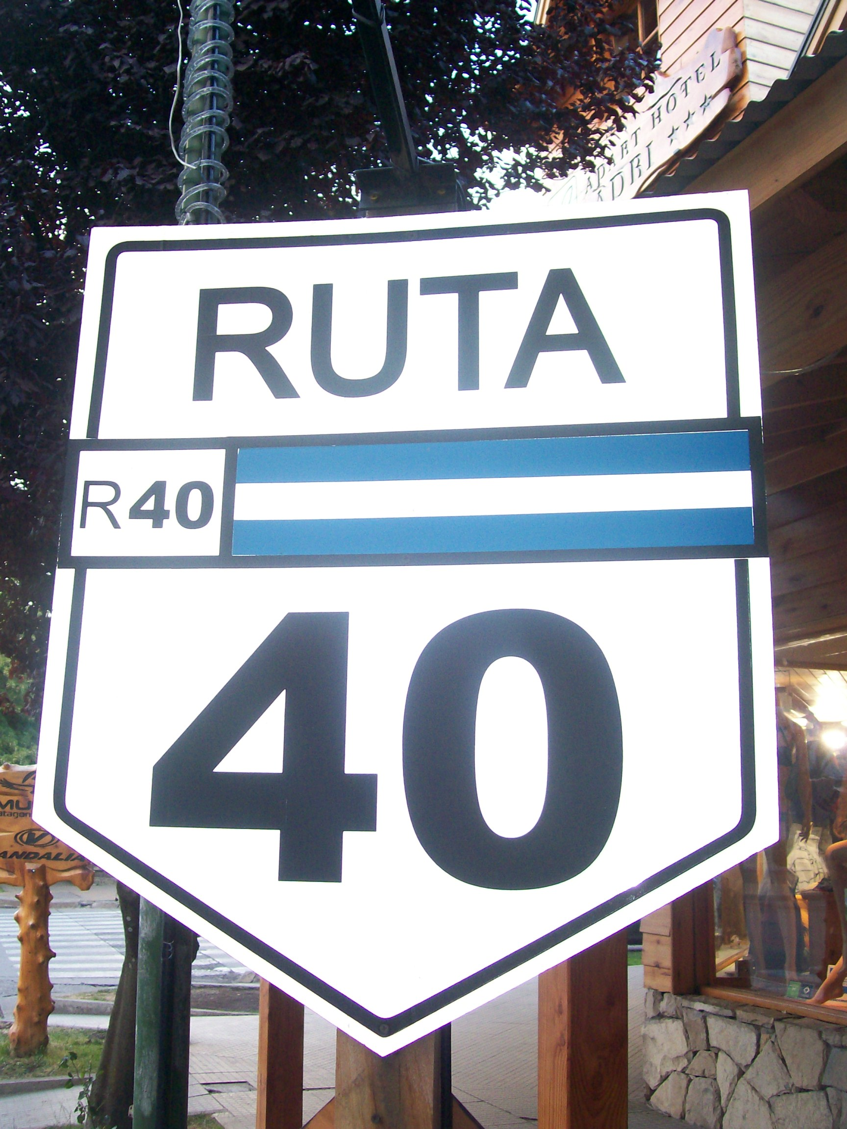 Cartel de la Ruta 40.